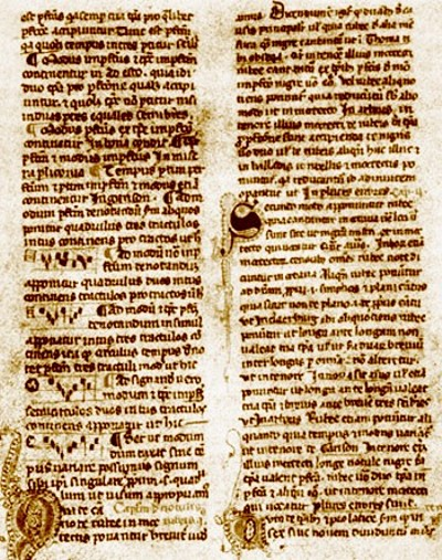 Página do tratado Ars Nova Musicae, de Philippe de Vitry